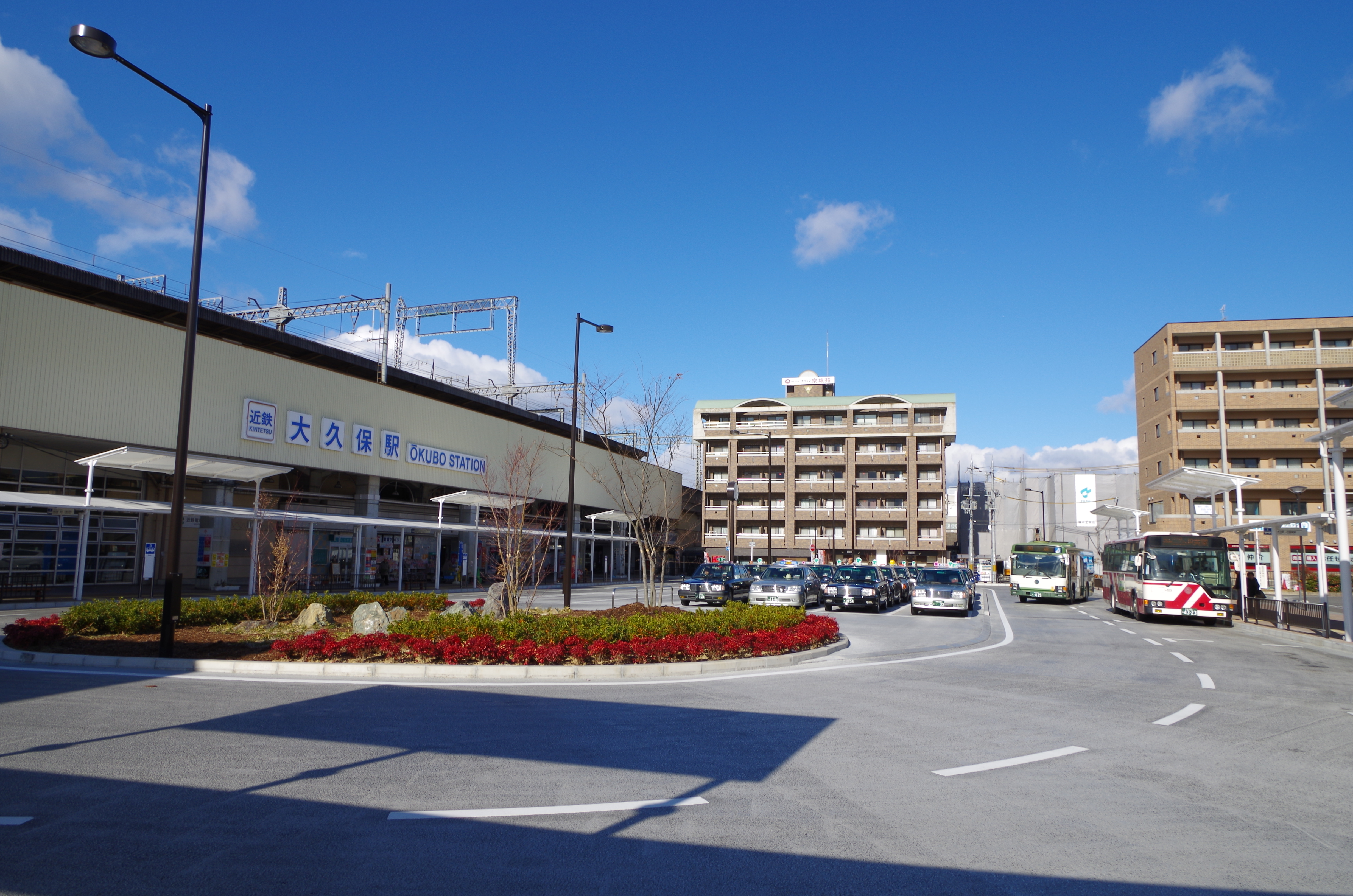 大久保駅広場 Ōkubo station square 2013.1.10